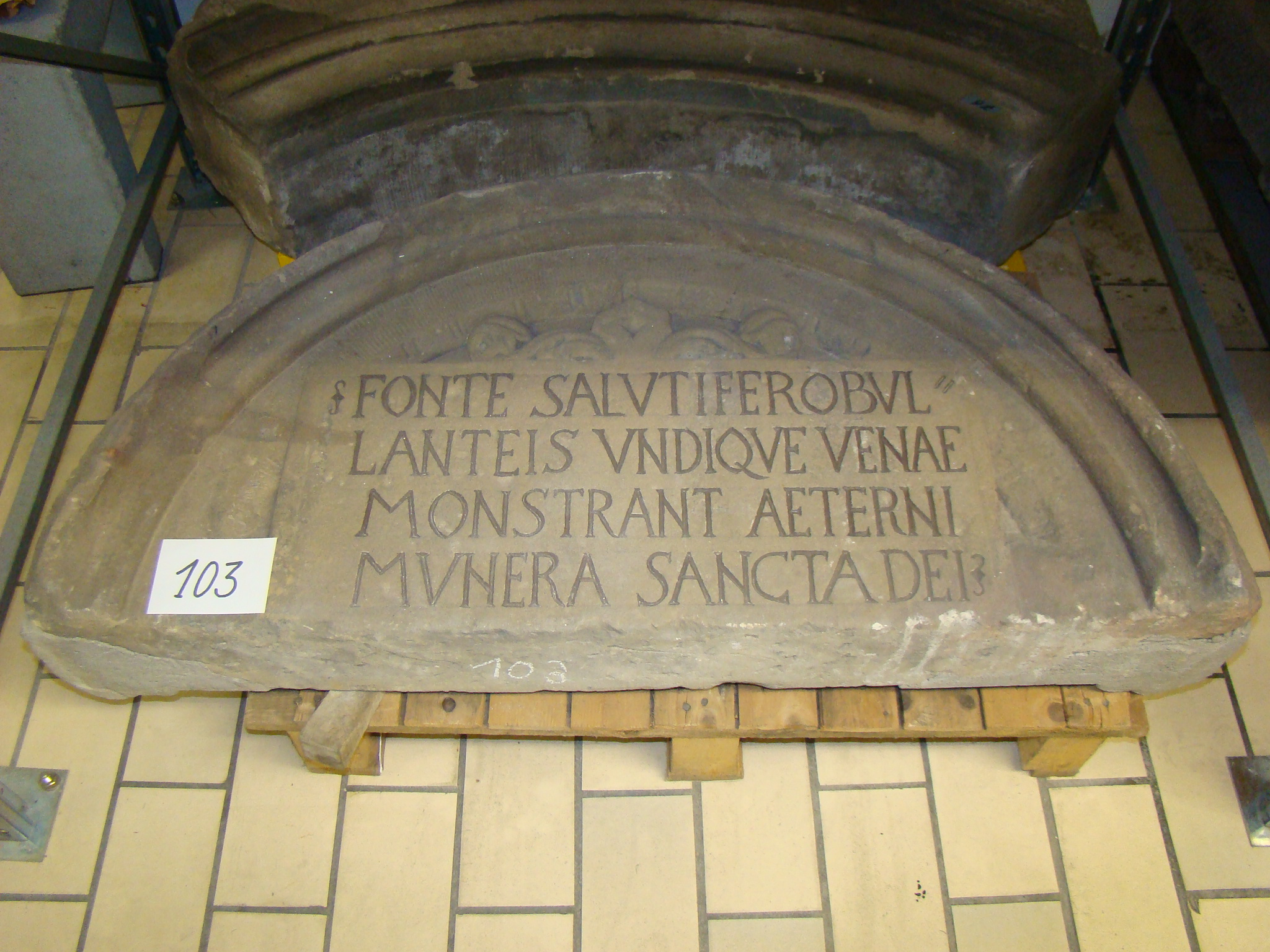 Originaler Tympanon vom Siebenröhrenbrunnen in Heilbronn, Foto aufgenommen im Heilbronner Lapidarium, Objekt ist inzwischen Teil der Dauerausstellung im Heilbronner Haus der Stadtgeschichte